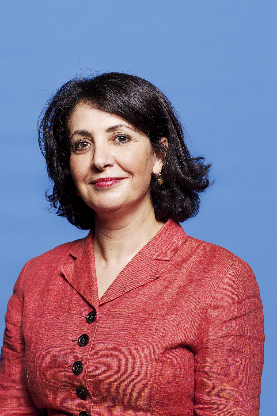 Khadija Arib, Tweede Kamerlid. Foto: Lex Draijer.